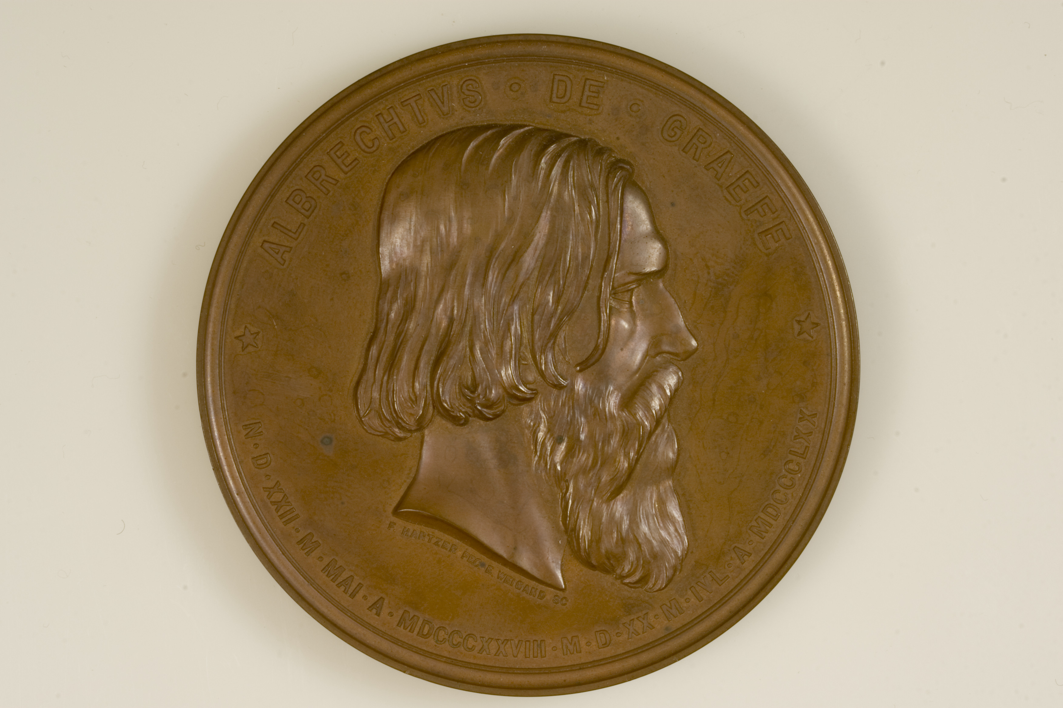 Avers einer bronzenen Ausgabe der Graefe-Medaille, die 1886 Hermann von Helmholtz in Gold verliehen wurde.